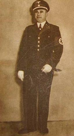 Paul Soppa (* 2. června 1905, Koppenfeld - 3. května 1947 v Praze) byl od roku 1939 do roku 1945 velitelem vězeňského oddělení gestapa v pankrácké věznici v Praze. Těsně před vypuknutím pražského povstání v květnu 1945 unikl do amerického pásma. Tady byl zajat a následně vydán československé komisi. Pro retribuční trestné činy byl odsouzen k trestu smrti a popraven ve věznici, ve které po celou dobu protektorátu působil.